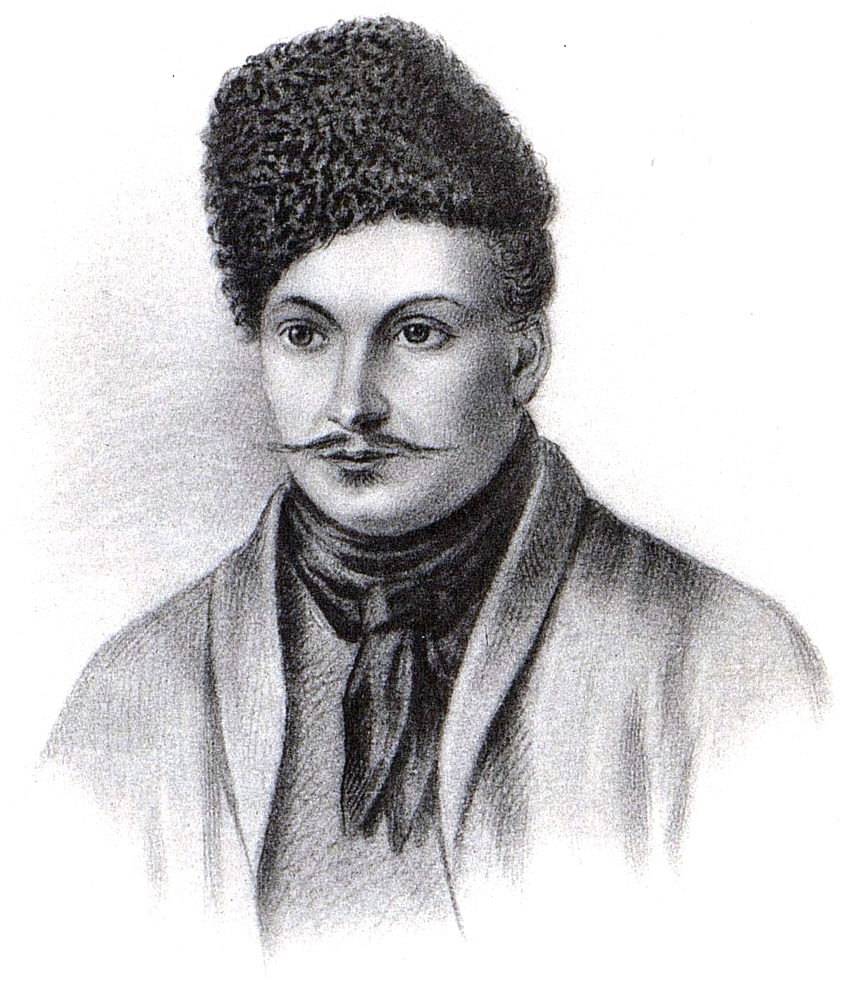 Давыдов, Василий Львович